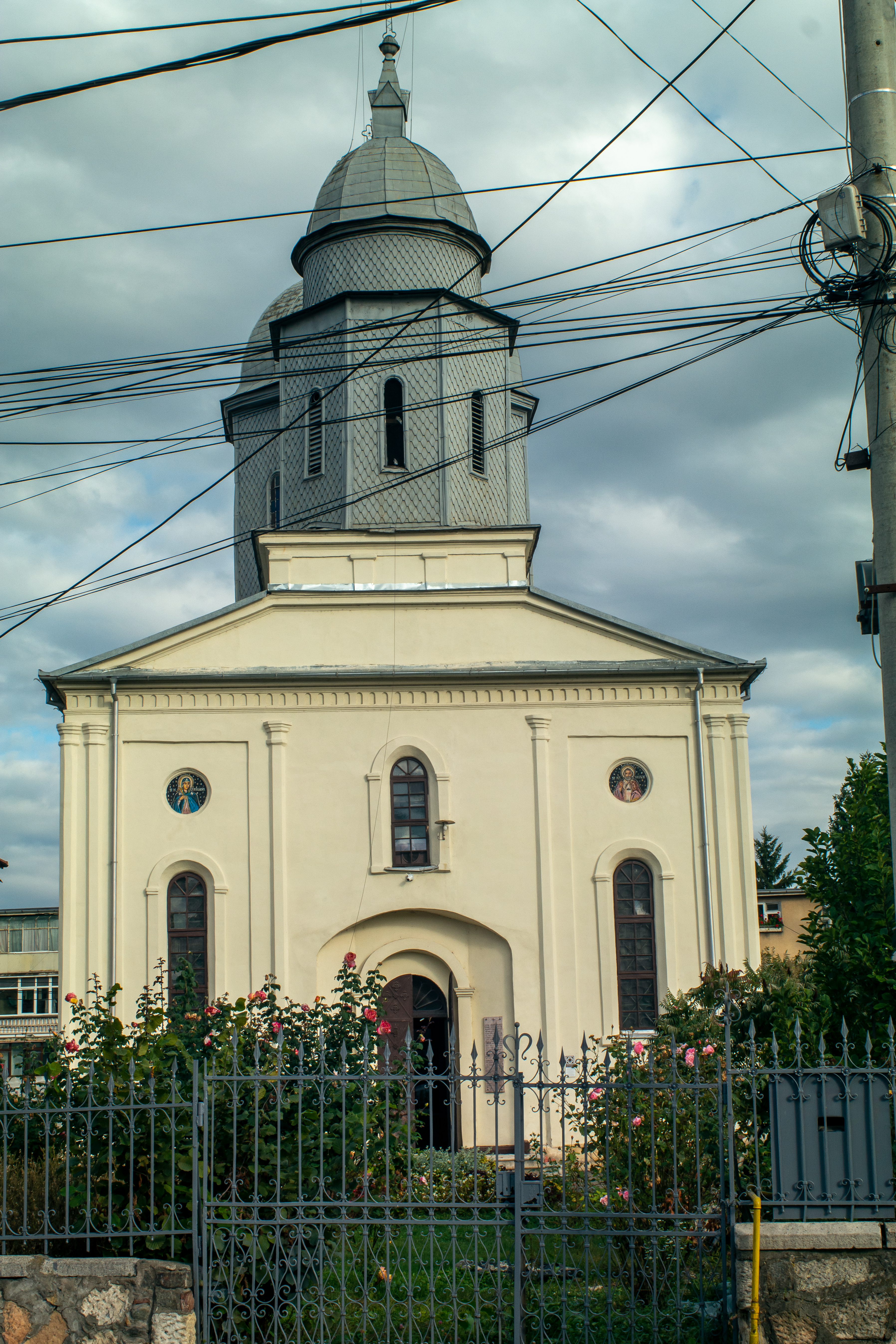 Biserica „Sf. Nicolae”-Domnească, Câmpulung. Ctitorită în 1567 de Doamna Chiajna și fiul său Petru cel Tânăr, a fost grav avariată de cutremure și reconstruită de două ori, în 1721 și 1870-1889, când primește planimetria prezentă, de factură neoclasică. Păstrează un remarcabil iconostas din lemn sculptat. 01